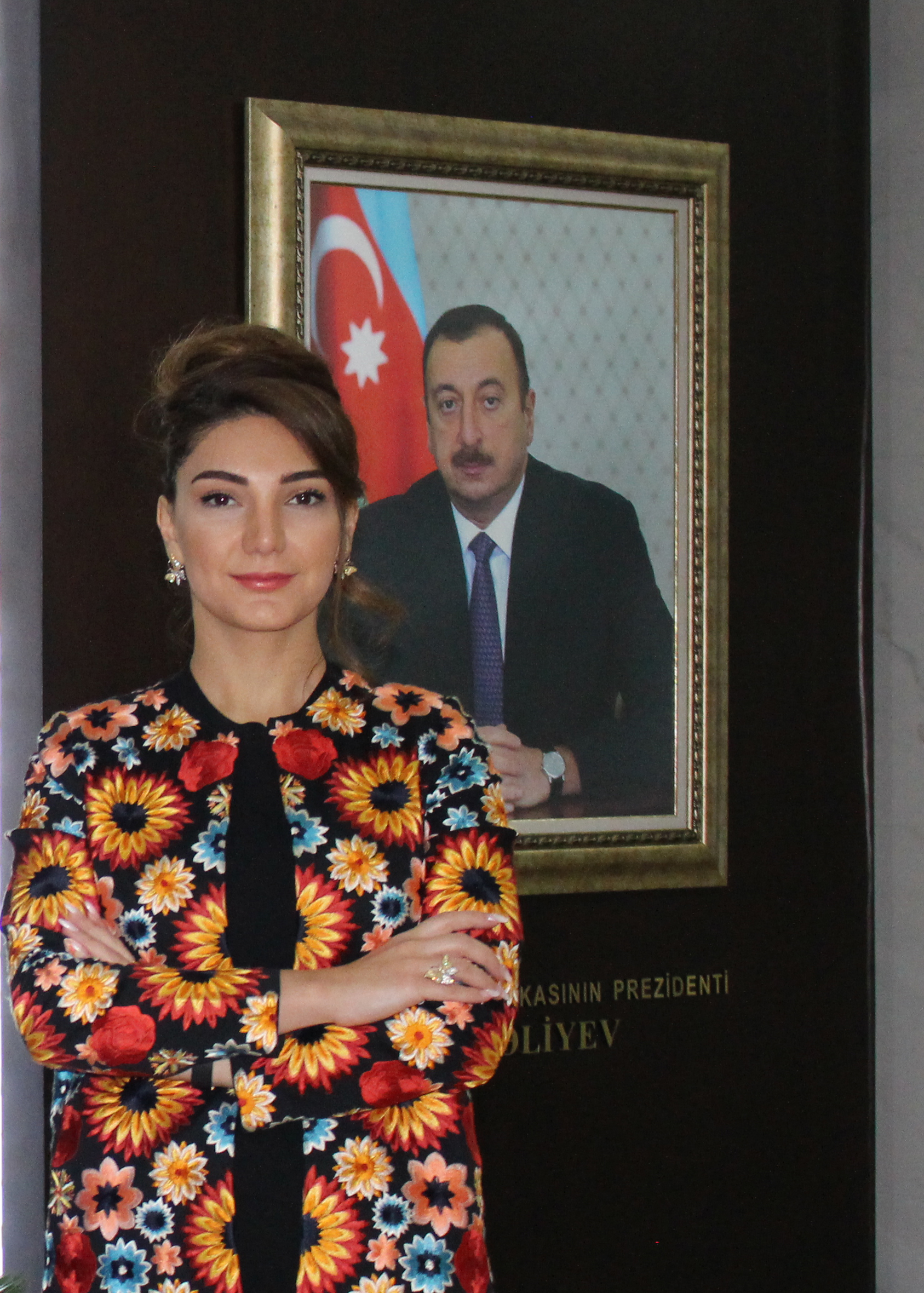 Azərbaycan Universitetinin rektoru